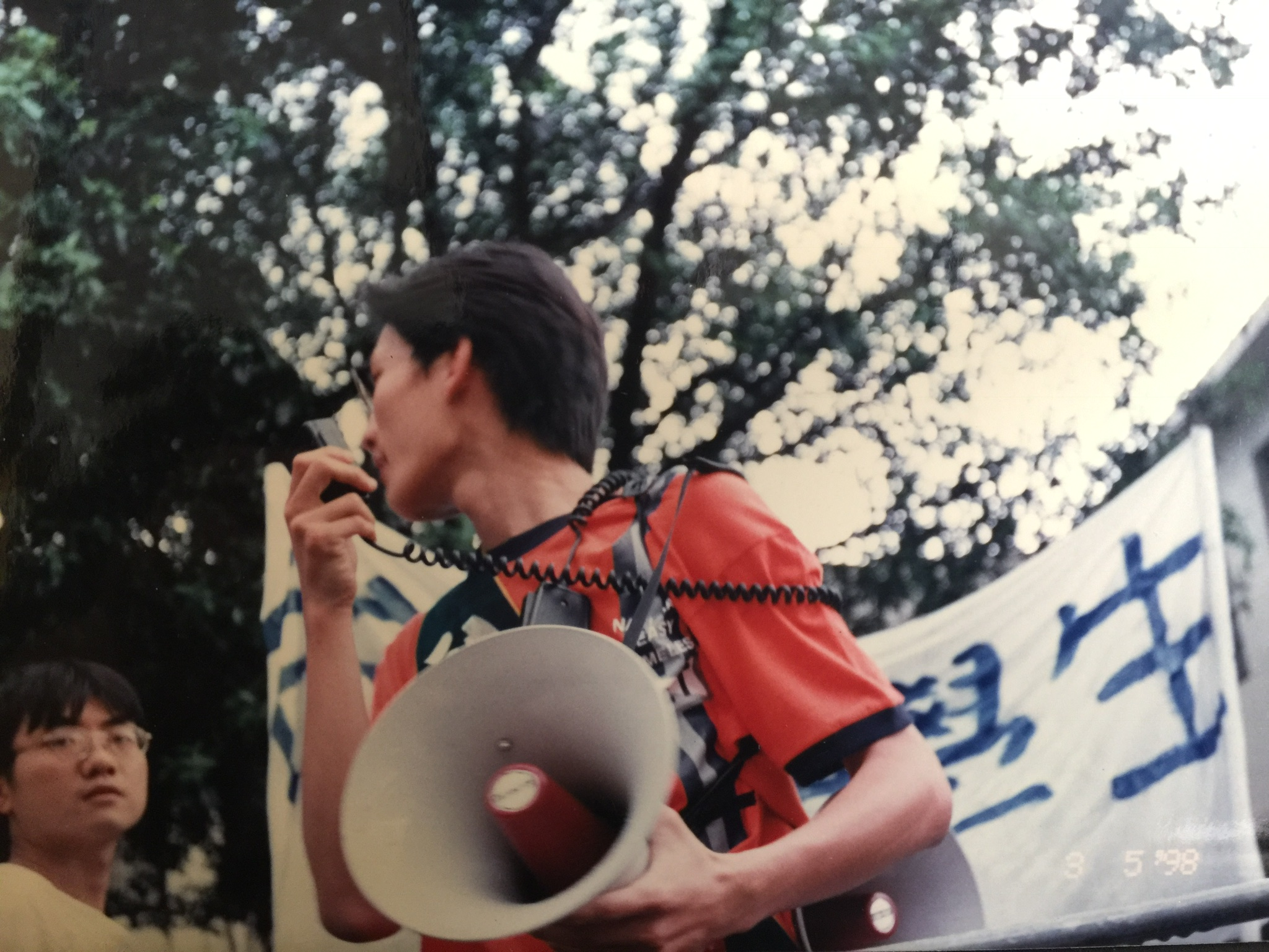 Zhang KaiJun